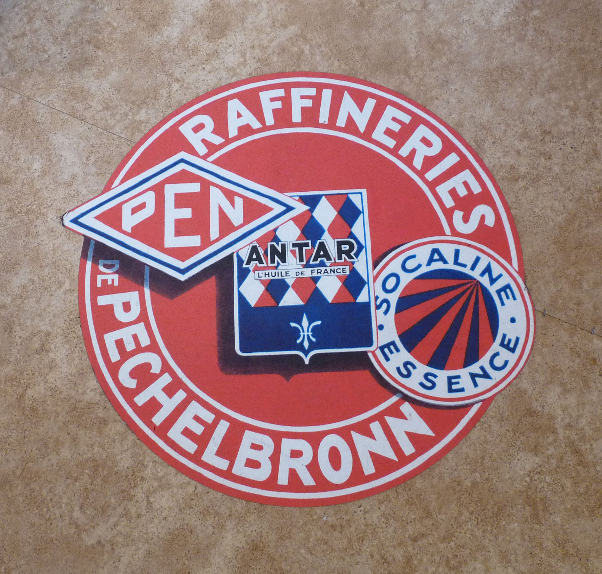 Musée français du pétrole à Merkwiller-Pechelbronn (Bas-Rhin)